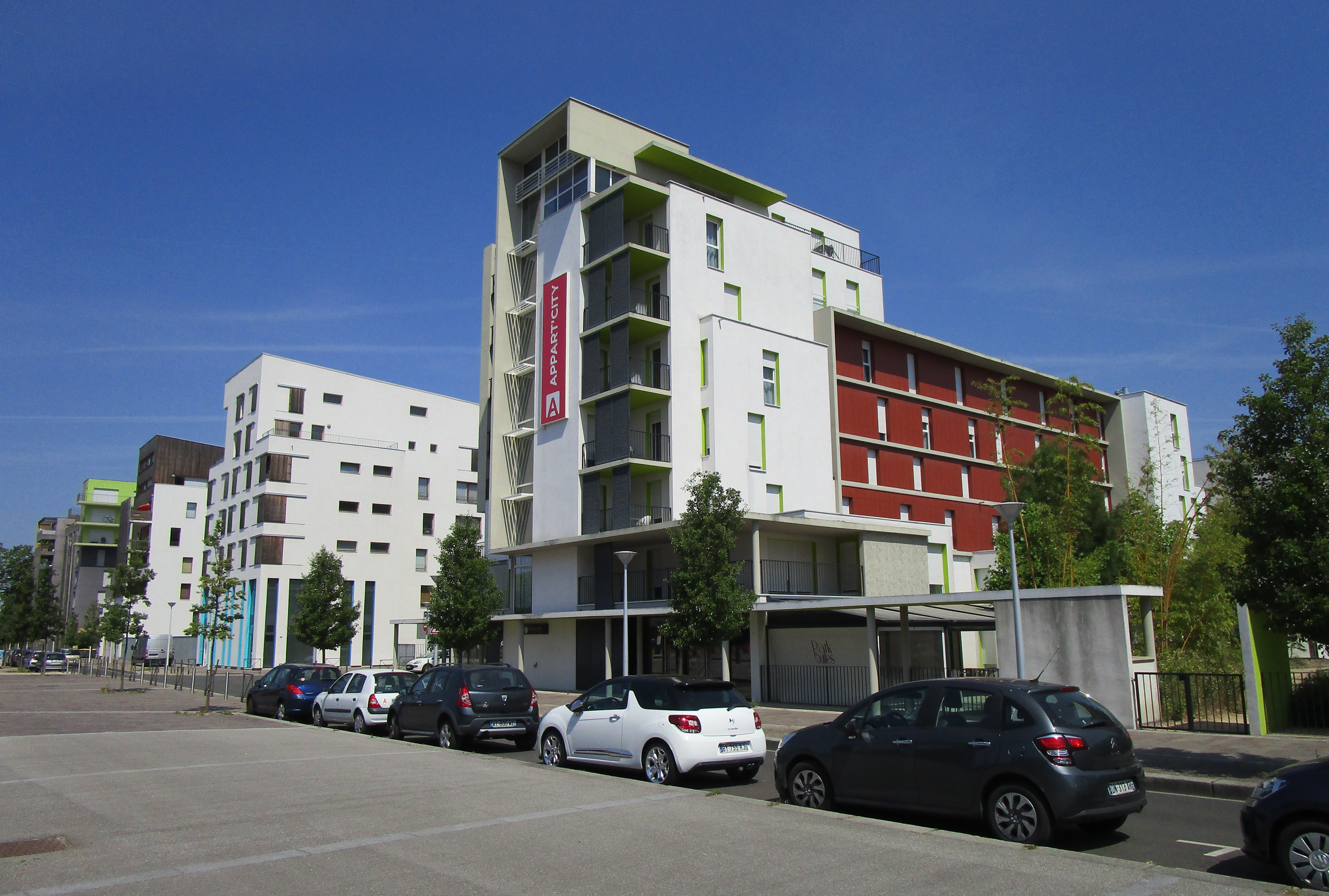 Vue de l'allée Ferdinand de Lesseps, dans le quartier des Deux-Lions à Tours. Au premier plan, la résidence de tourisme Park Suites, comprenant 110 studios. Construit en 2011.